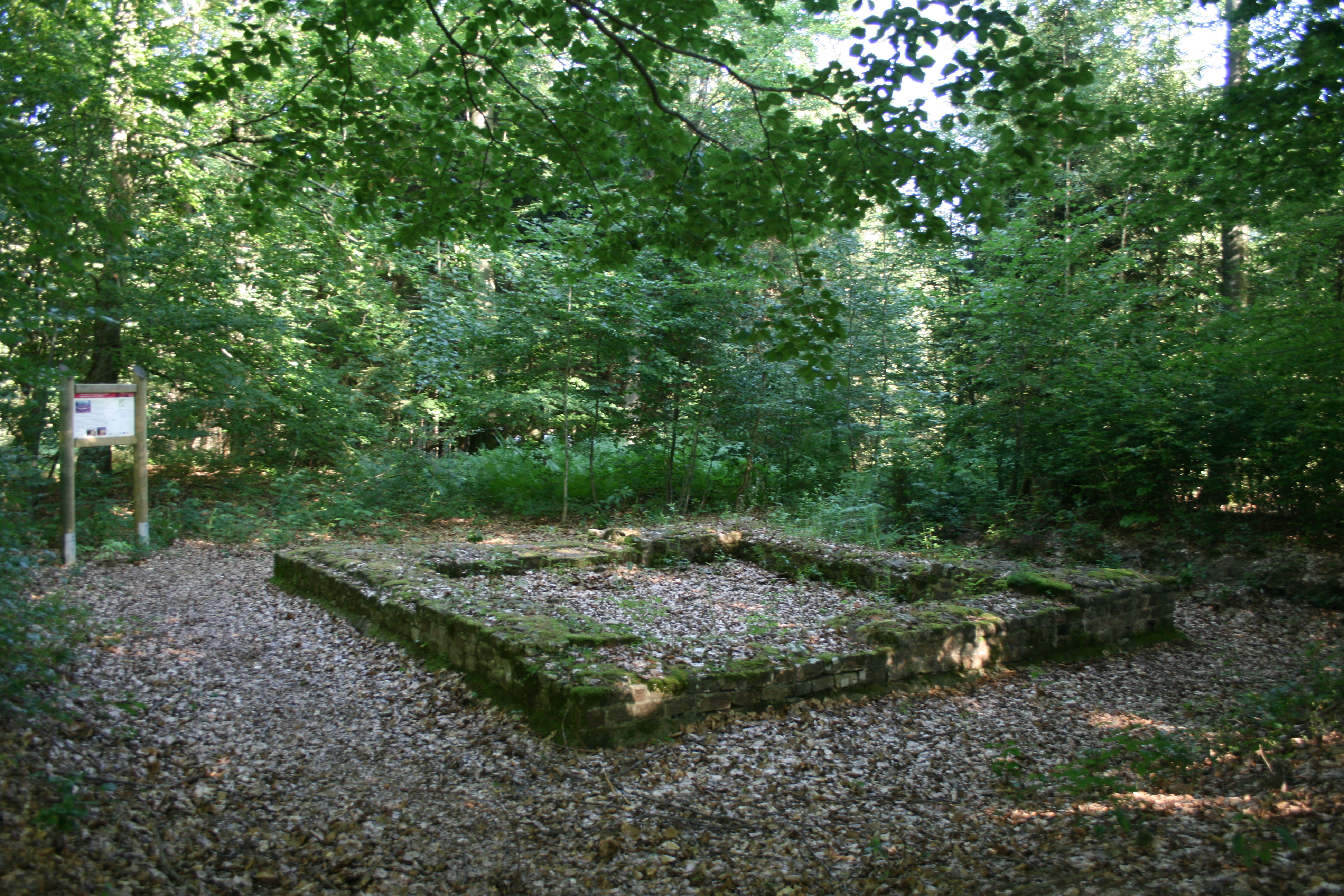 Wp 10/22 „Am Vogelherdschlag“ bei Michelstadt-Würzberg, rekonstruierte Fundamente der Steinturmstelle mit Schautafel, Juli 2010.